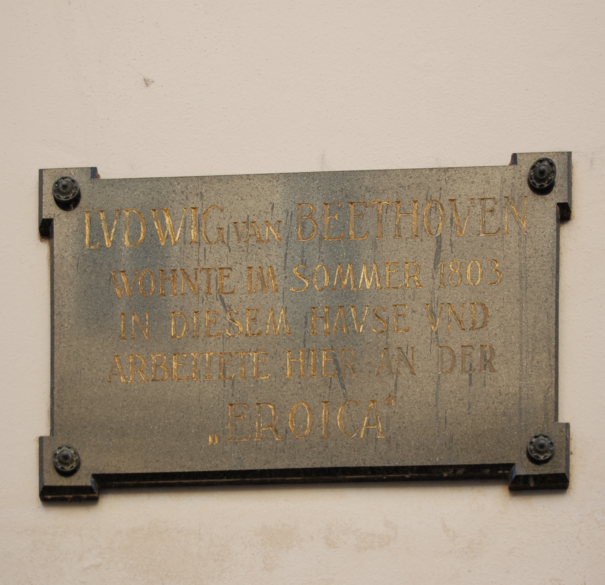 Der Biederhof bzw. Beethoven-Haus in der Döblinger Haupstraße 92 in Wien-Döbling.